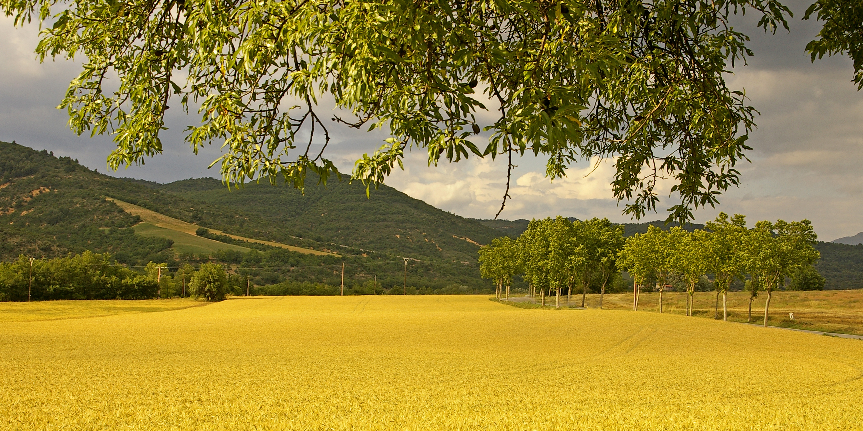 La lumière de fin d'après midi ravive les couleurs chaudes de la végétation de ce paysage impressionniste.